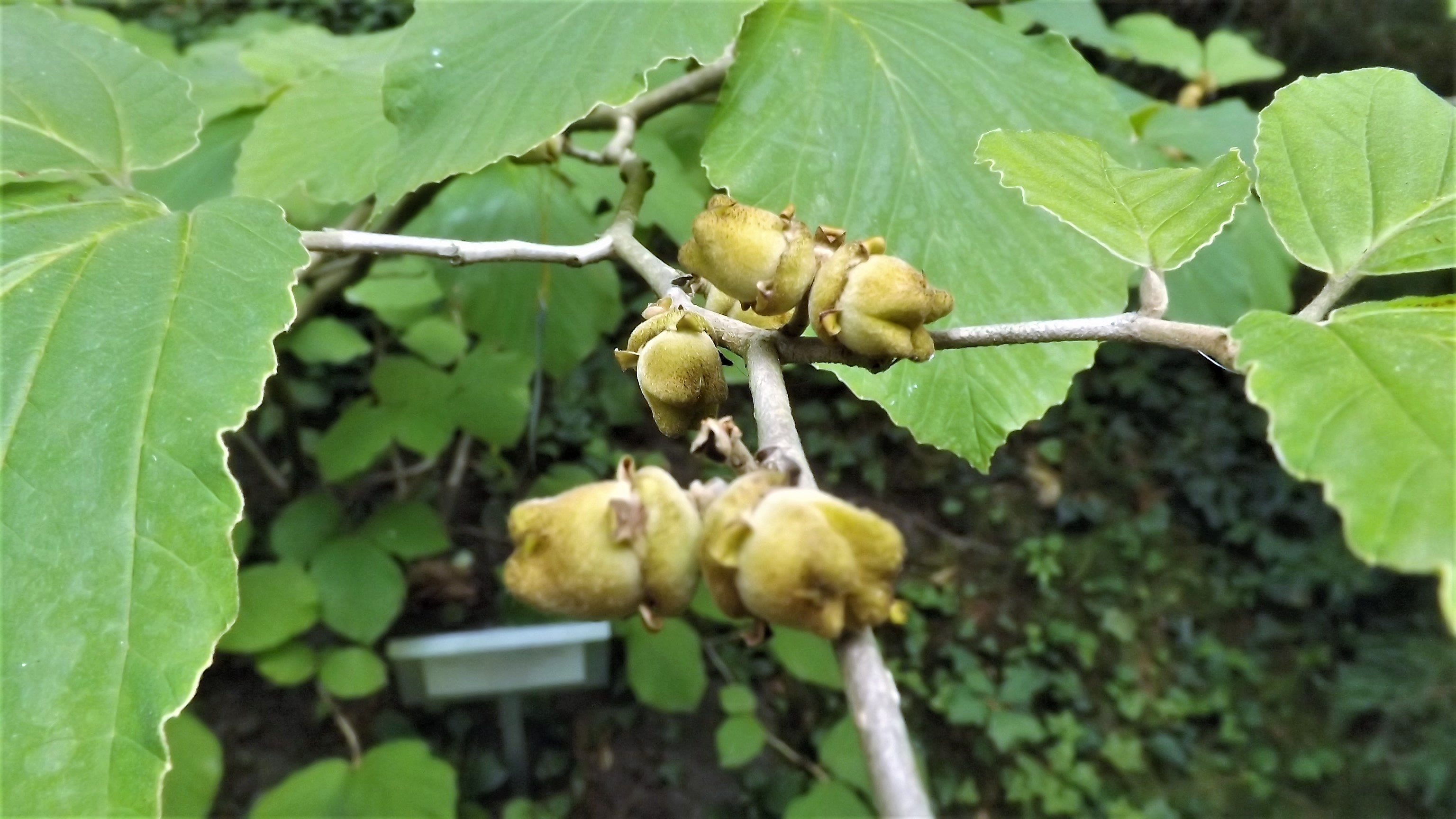 Vácrátóti botanikuskert, kerti varázsmogyoró termése